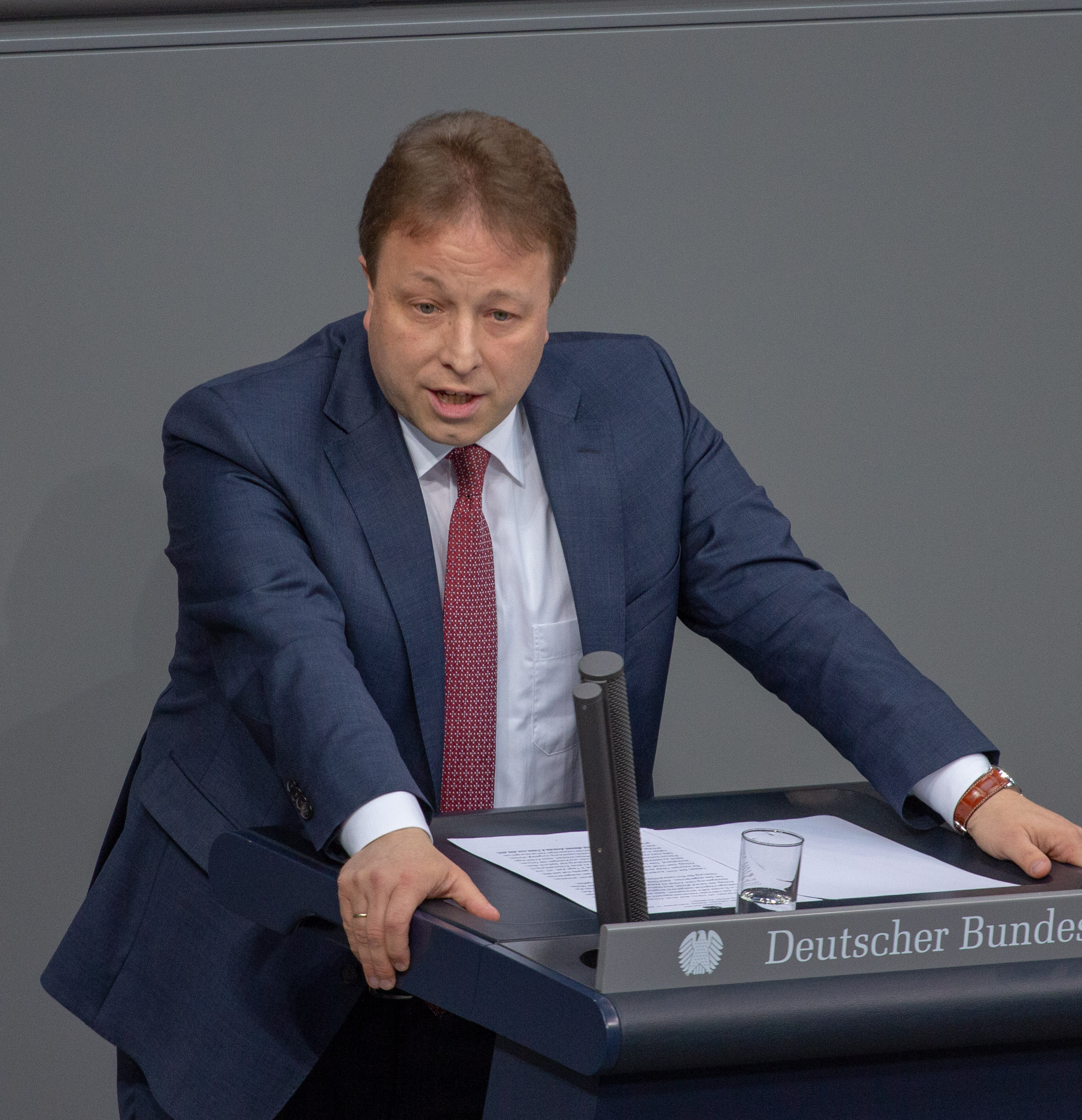 Sebastian Steineke, Mitglied des Deutschen Bundestages, während einer Plenarsitzung am 12. April 2019 in Berlin.